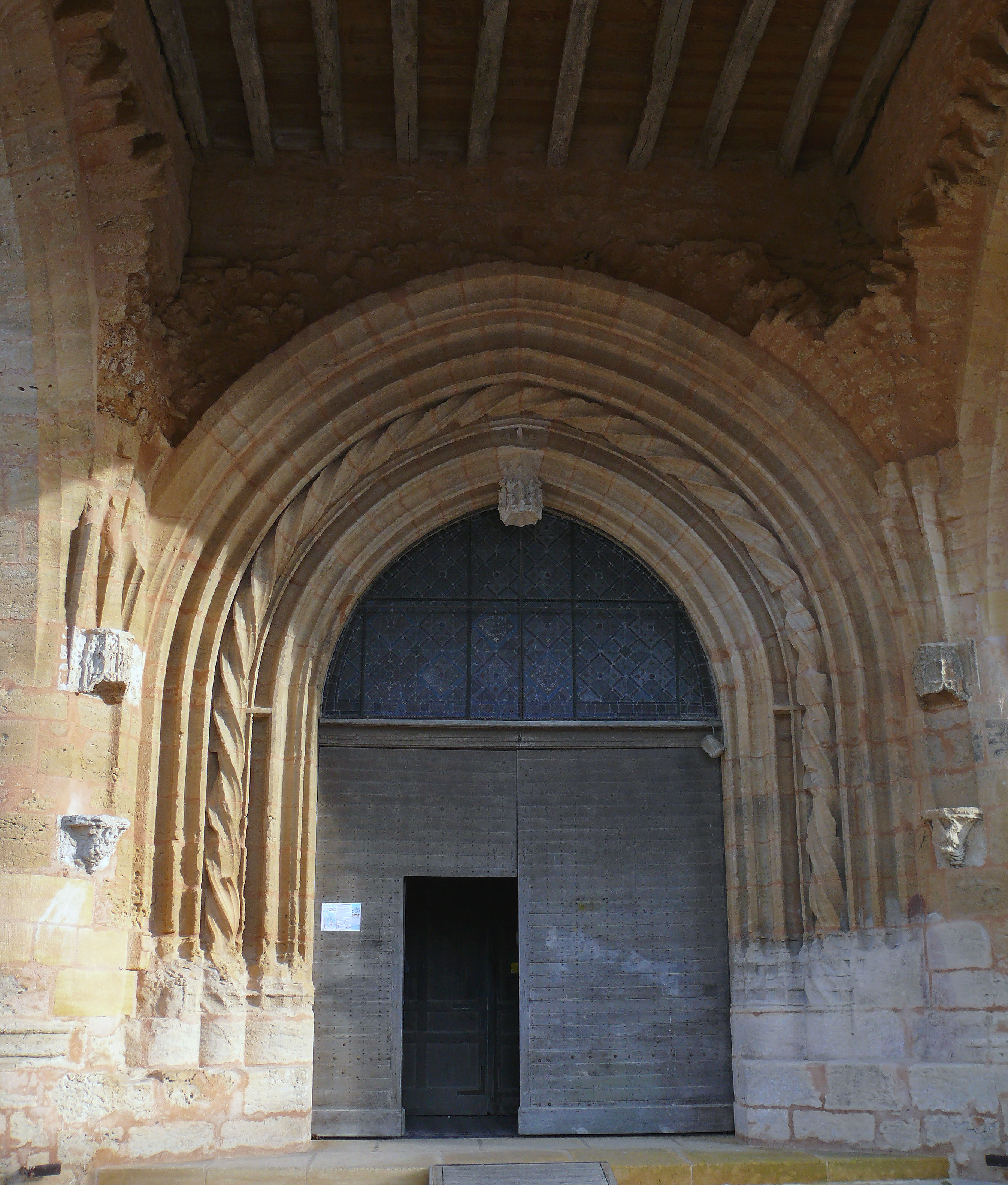 Belvès - Église Notre-Dame-de-l'Assomption - Portail du porche